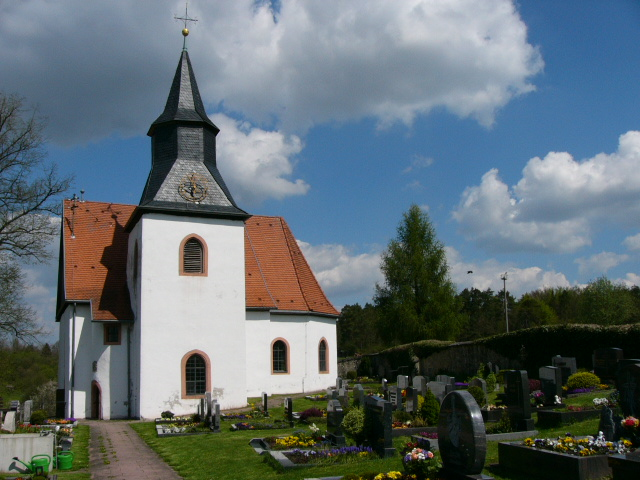 Kirche von Krögelstein